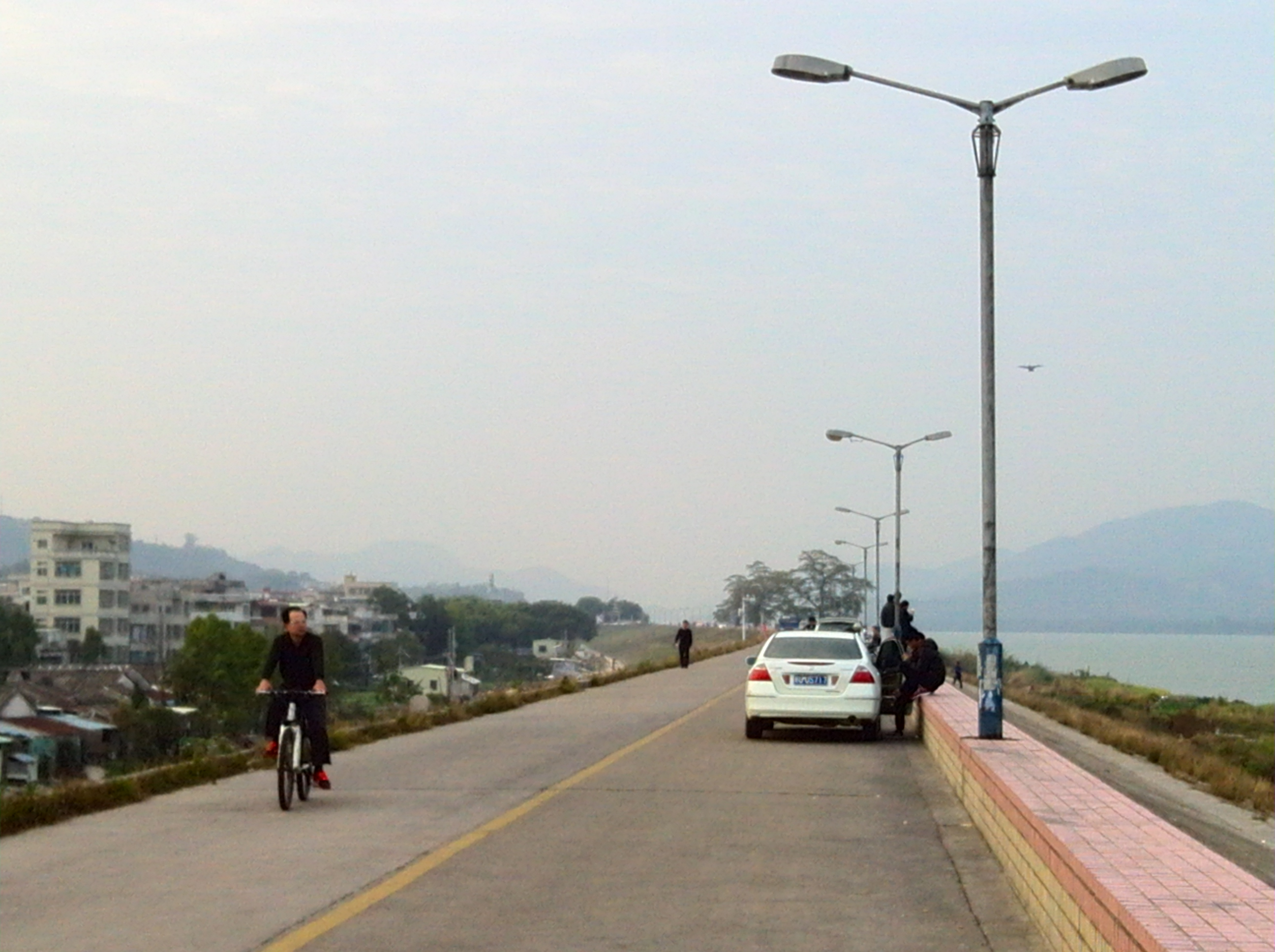 潮州北堤，位于韩江西岸。